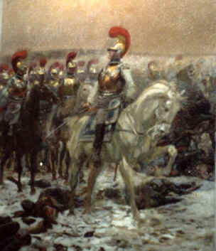 French Carebiners in Russia